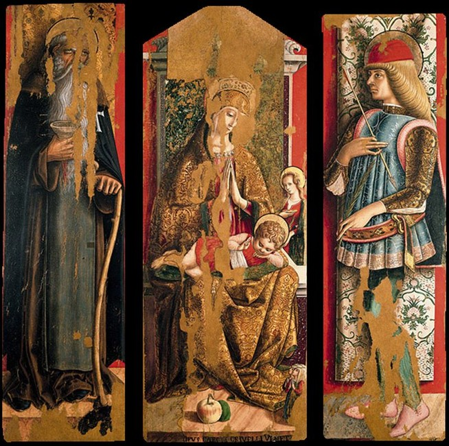 Carlo crivelli, secondo trittico di valle castellana